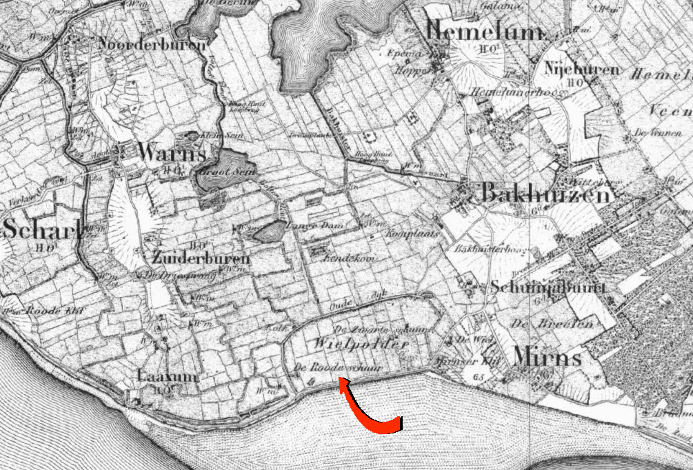 Detail van een oude topografische kaart van Nederland met het zuidwesten van de huidige (anno 2017) gemeente Súdwest-Fryslân (rode pijl door mij toegevoegd)